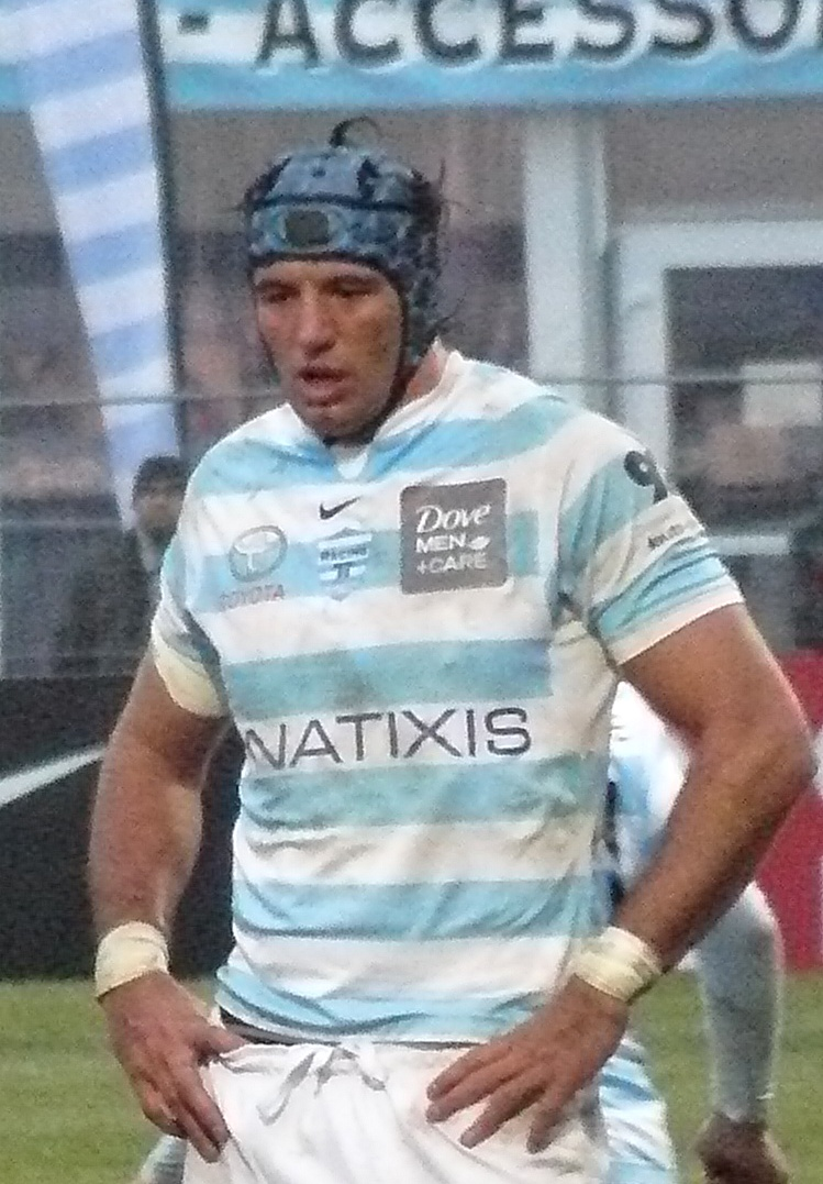 Santiago Dellapé, troisième ligne du Racing Métro 92, lors du match contre le CS Bourgoin-Jallieu, le 3 janvier 2010 à Colombes.